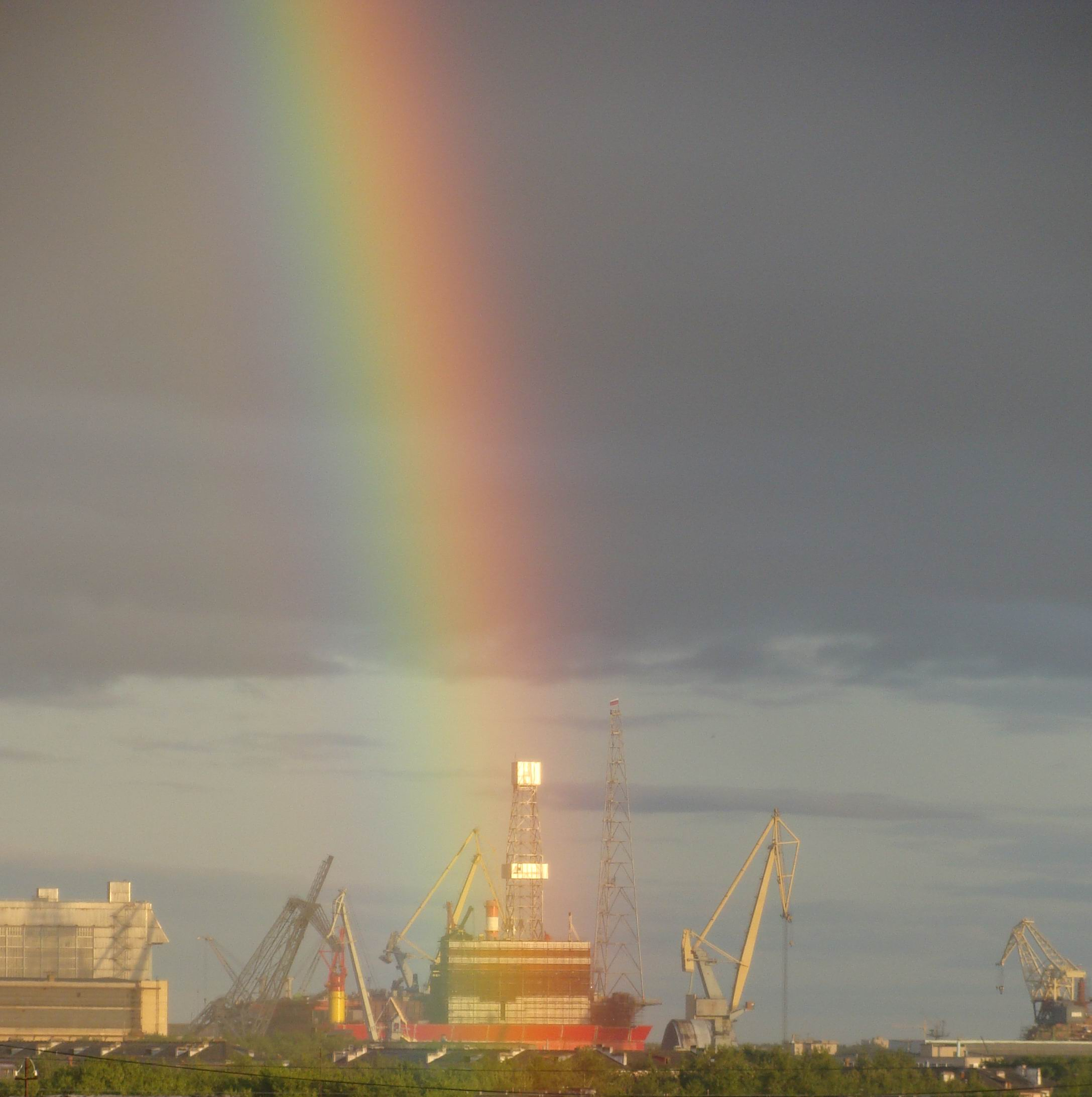 Строительство морской ледостойкой стационарной платформы (МЛСП) «Приразломная» на предприятии города Северодвинска ОАО «ЦС „Звёздочка“».